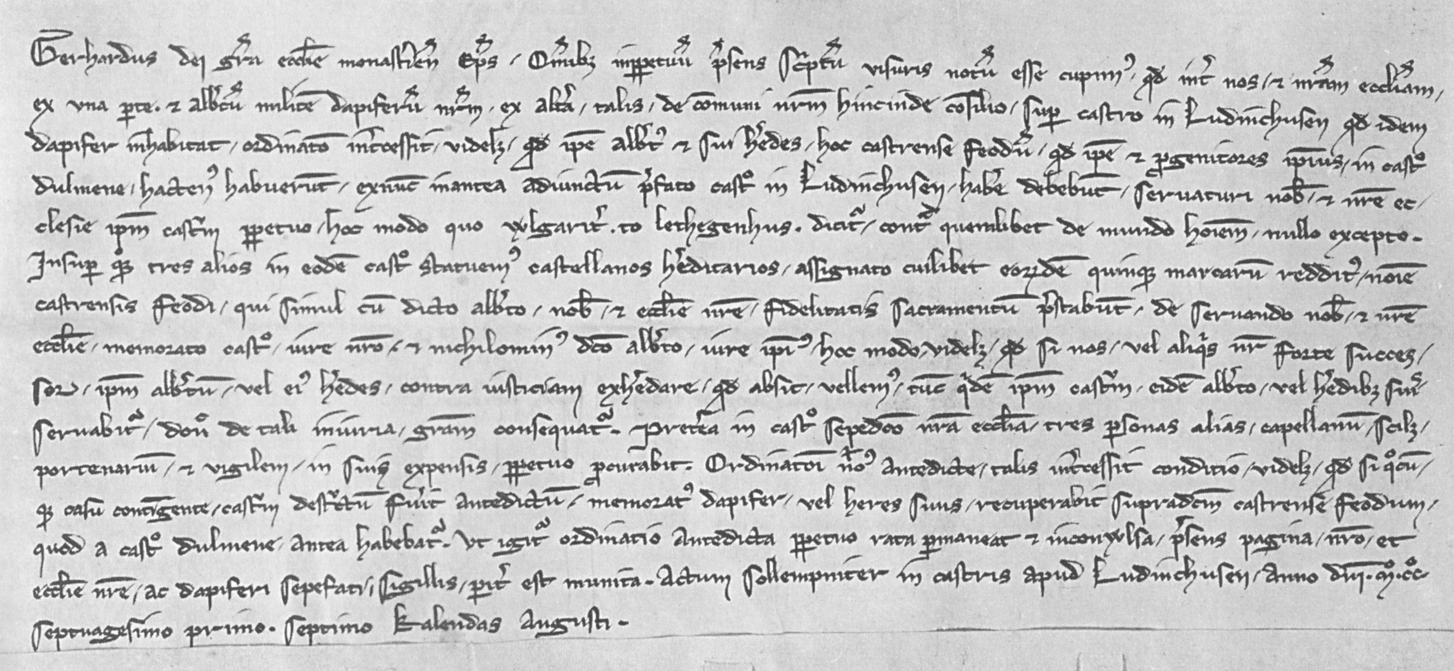 Urkunde aus dem Jahr 1271, mit der Bischof Gerhard von der Mark den Drosten Albert mit der Burg Vischering belehnt